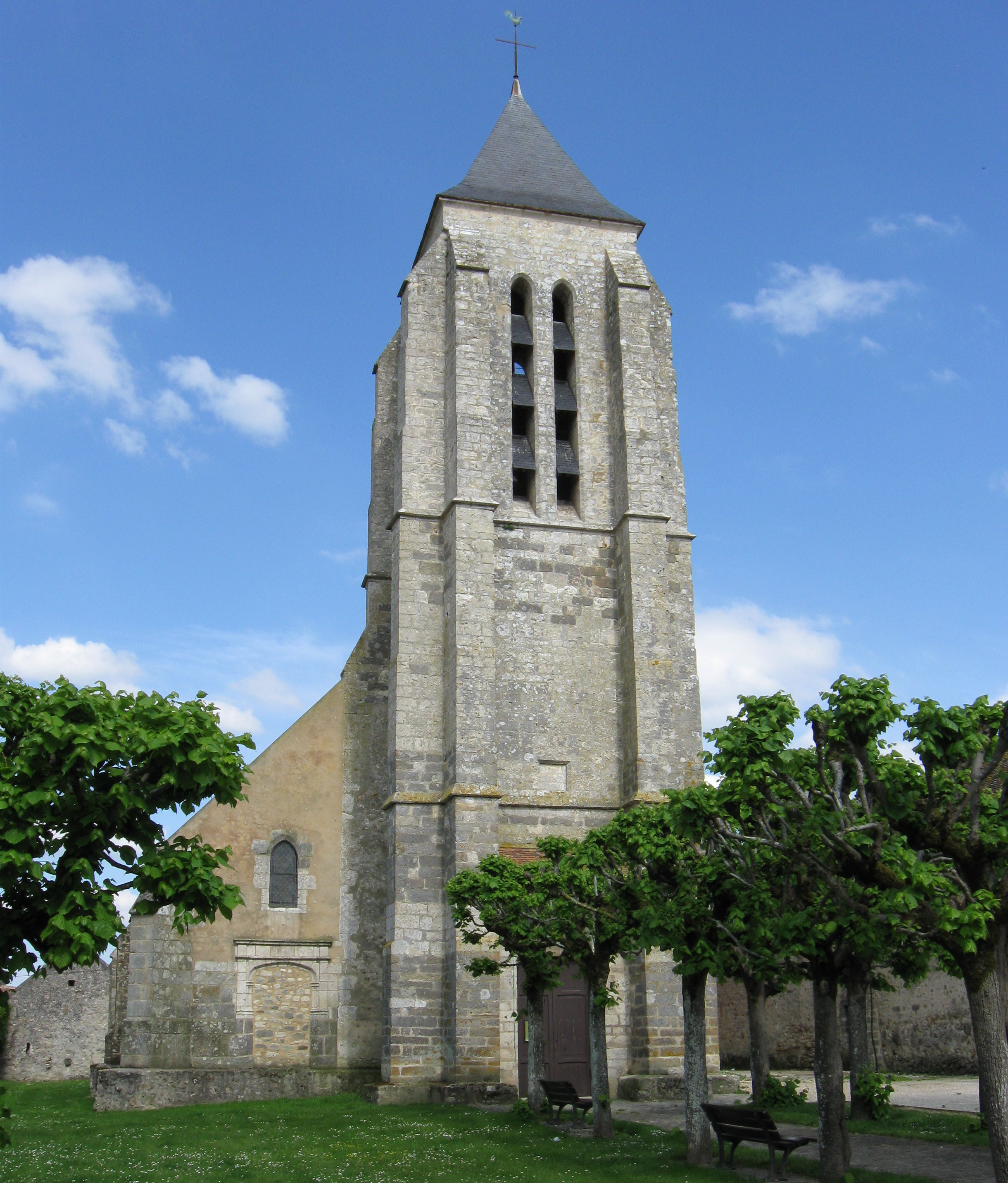 Église Notre-Dame de Villemer. (département de la Seine-et-Marne, région Île-de-France).